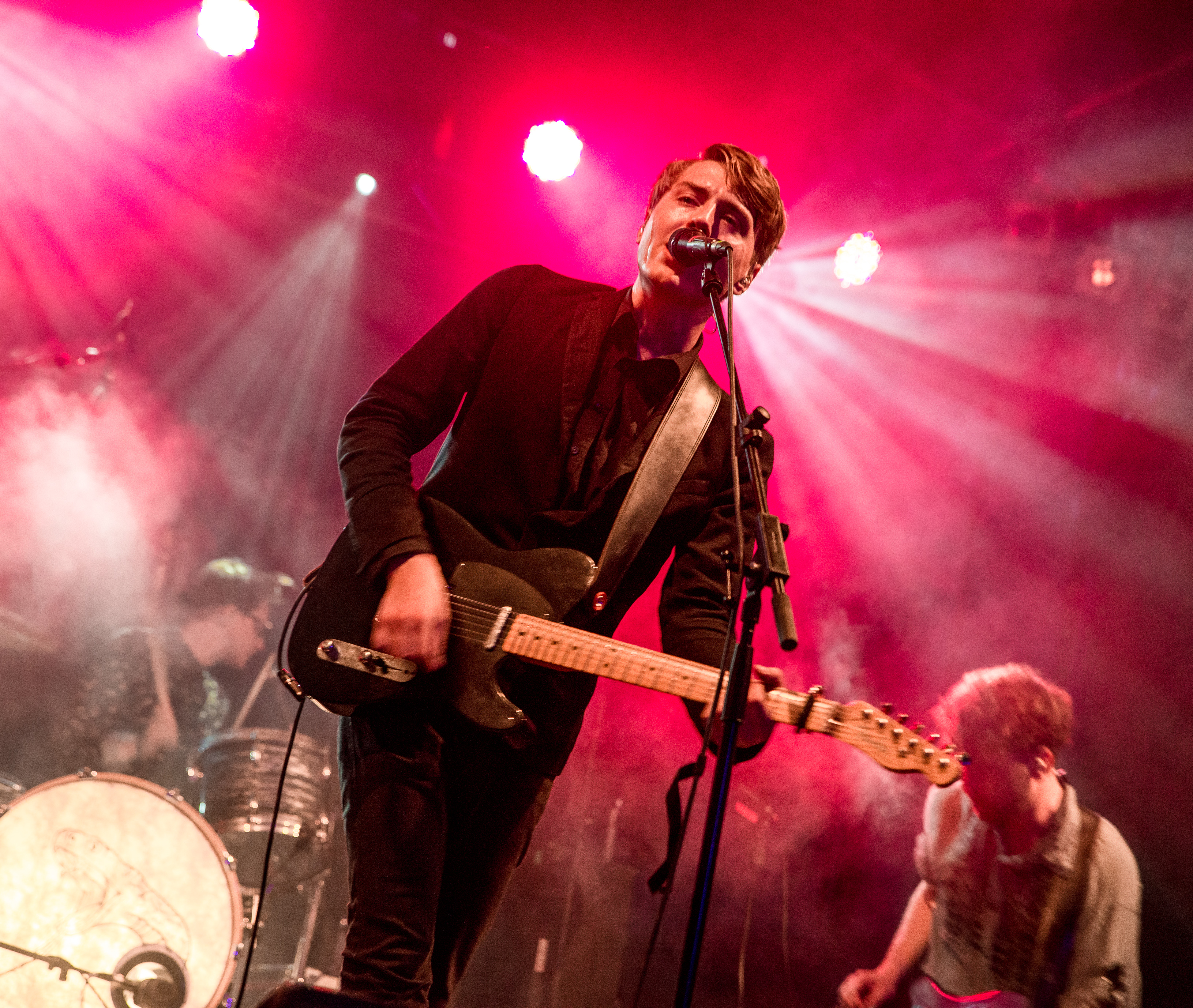 de